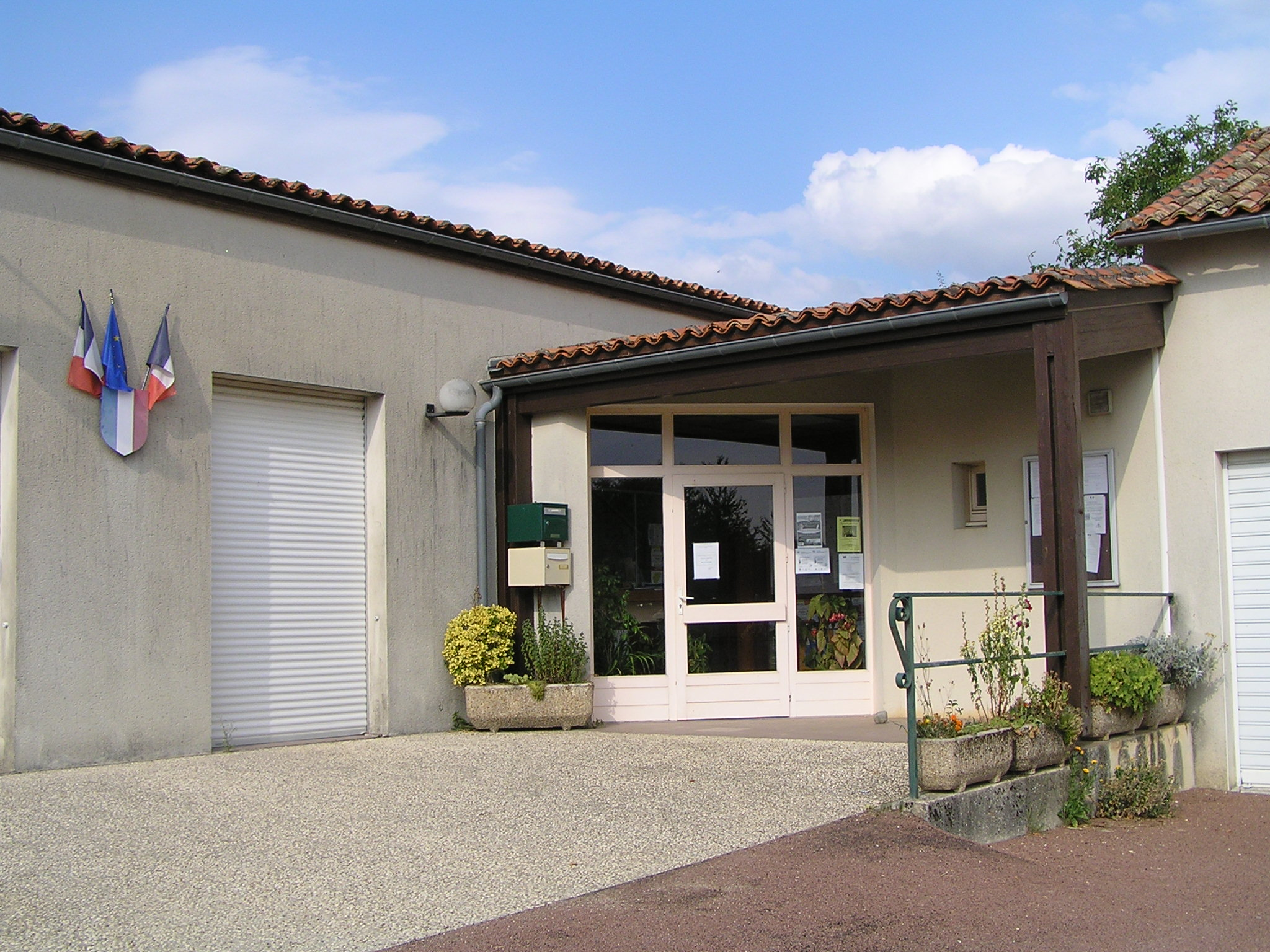 mairie de Saint-Martin-du-Clocher